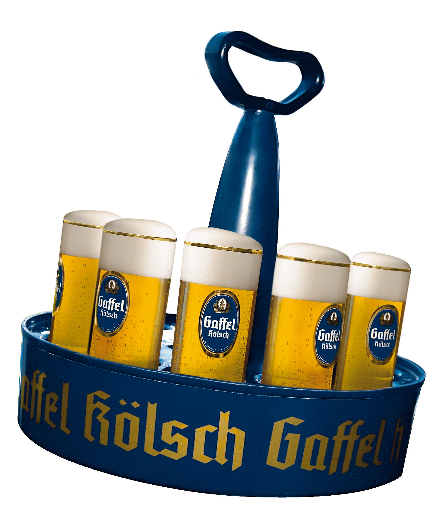 Eine Runde Gaffel Kölsch: Der Kölsch-Kranz mit vollen Kölsch-Stangen á 0,2 Liter